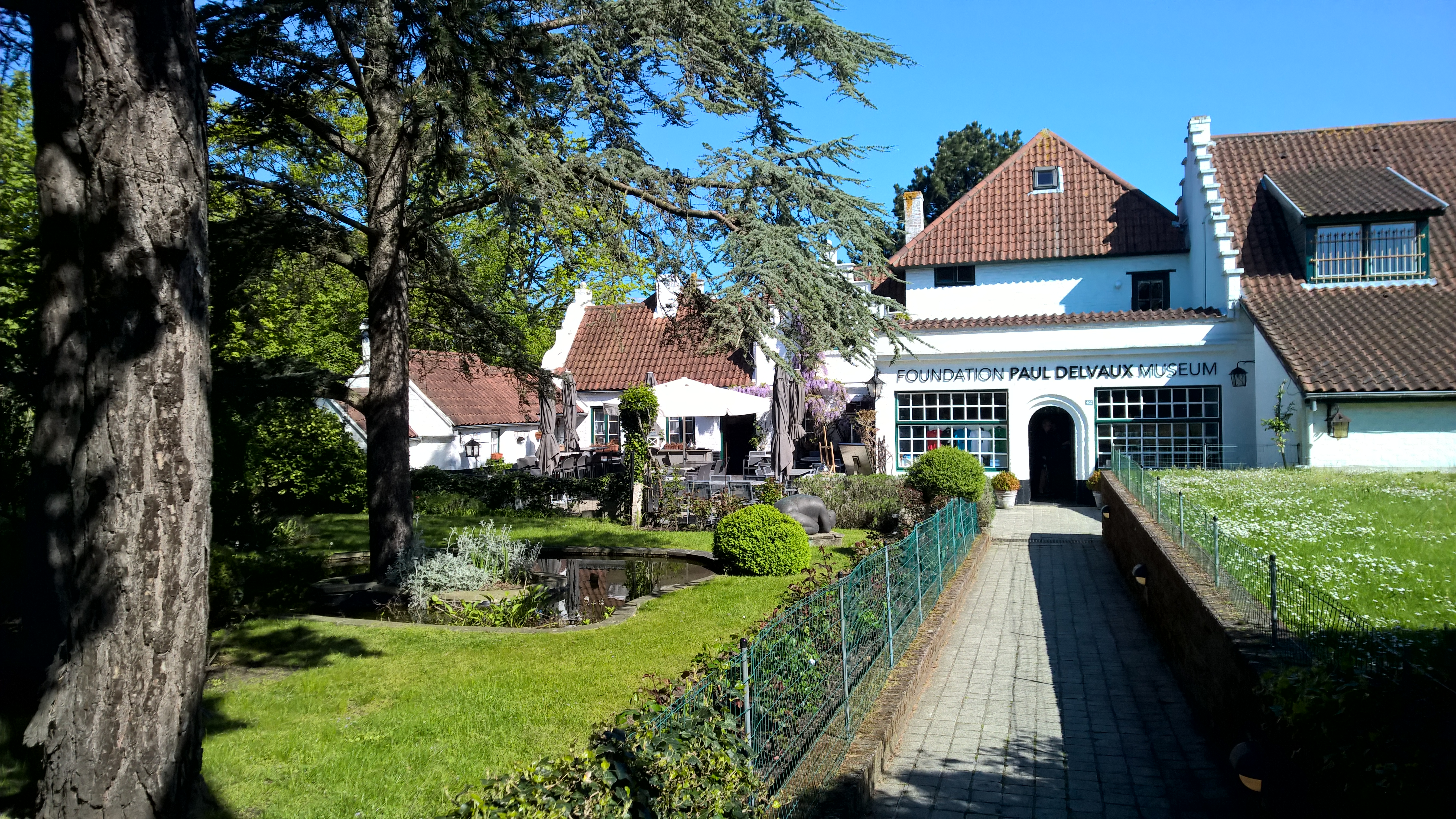 Musée et fondation Paul Delvaux